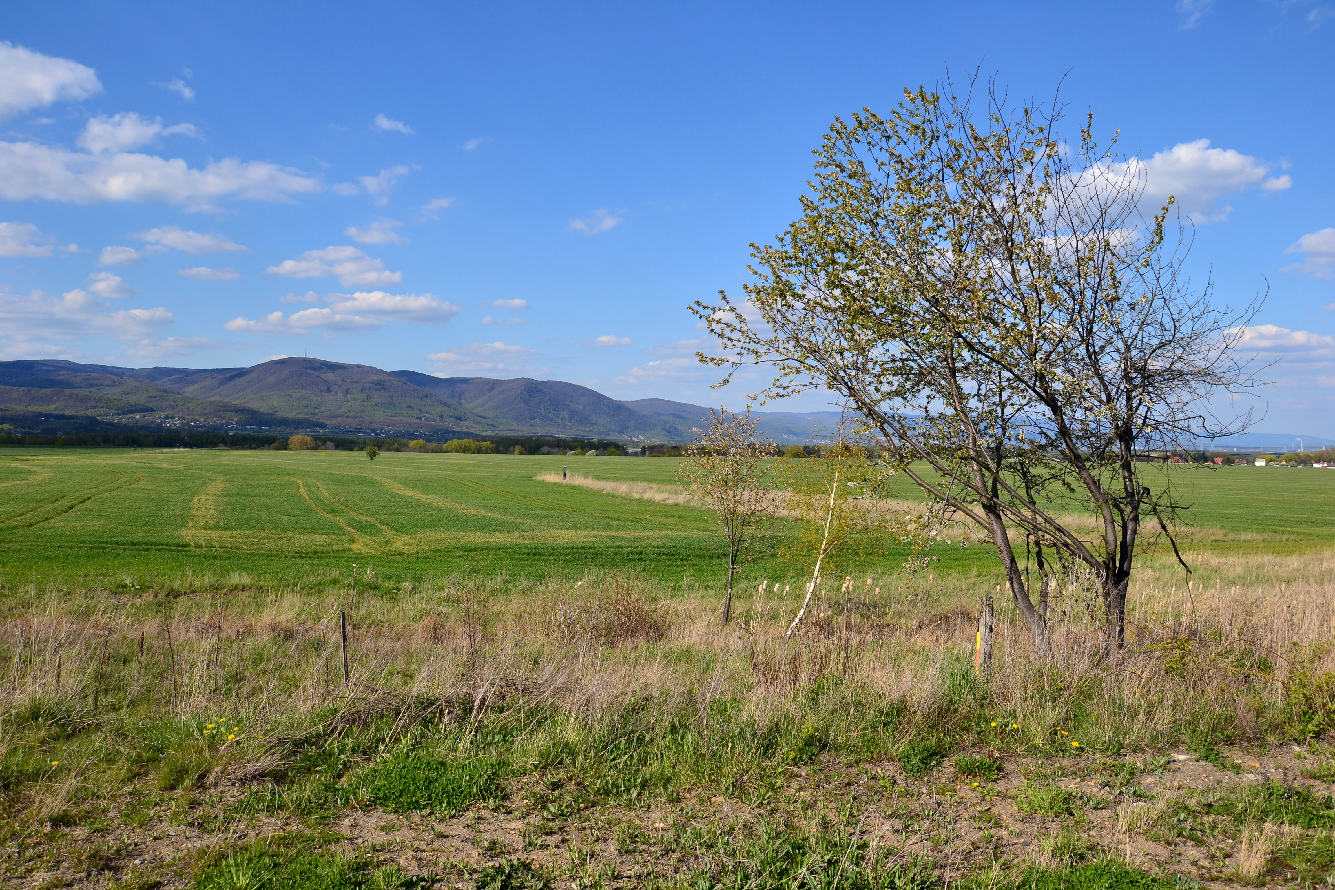 Krajina mezi Jirkovem, Zaječicemi a Otvicemi